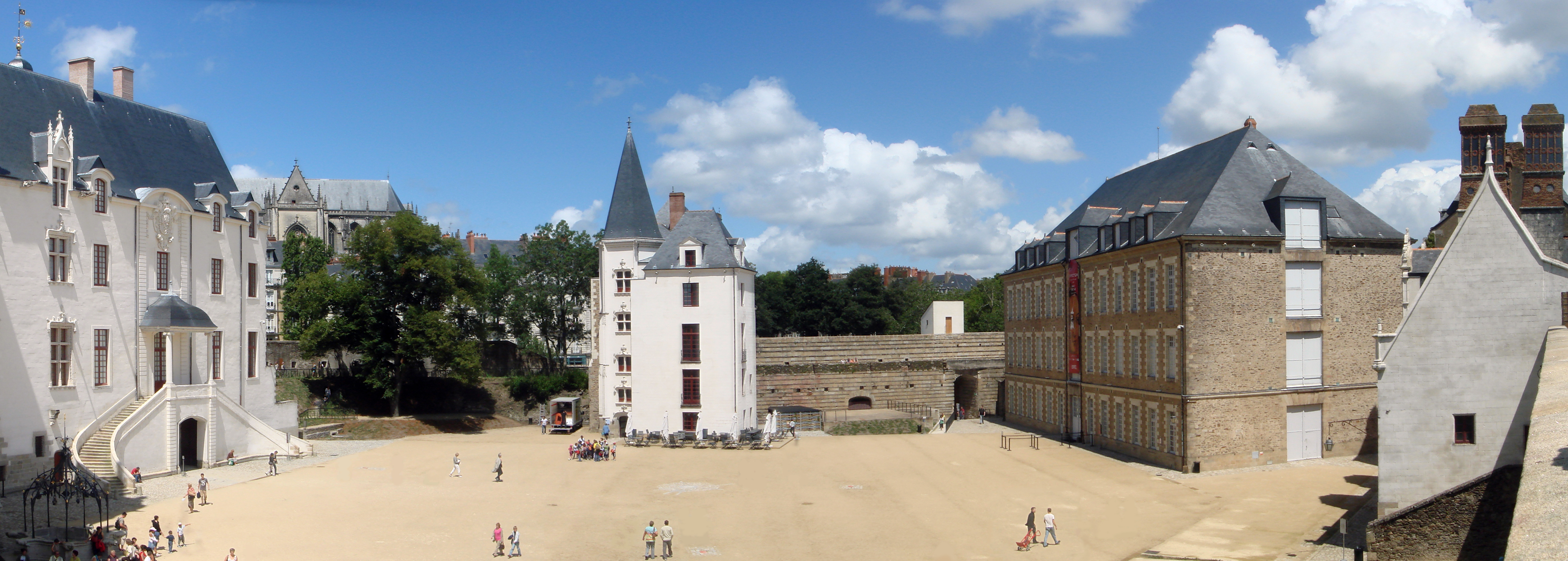 Chateau des ducs de Bretagne - panorama